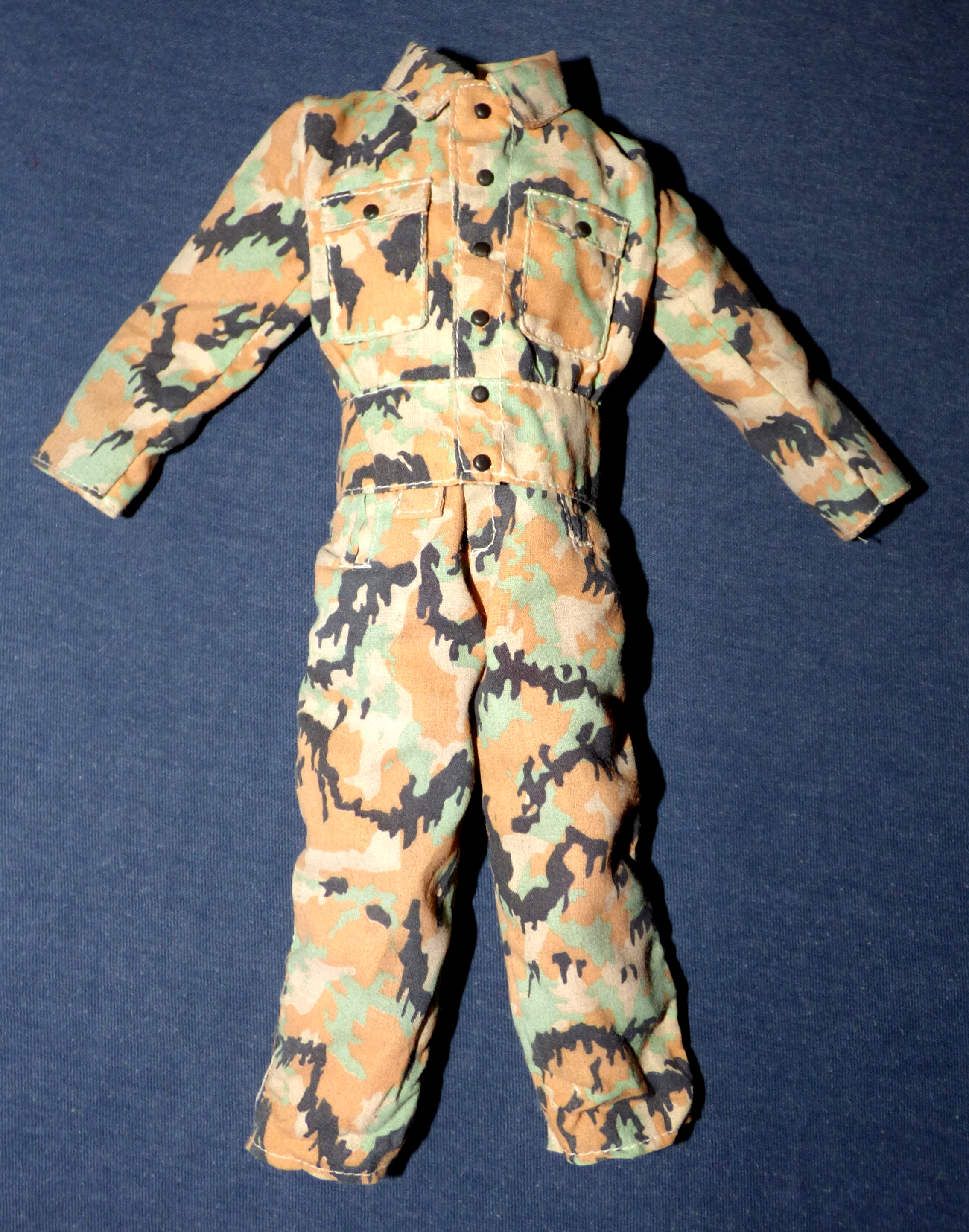 Leibermuster der Wehrmacht in 1:6 Nachbildung